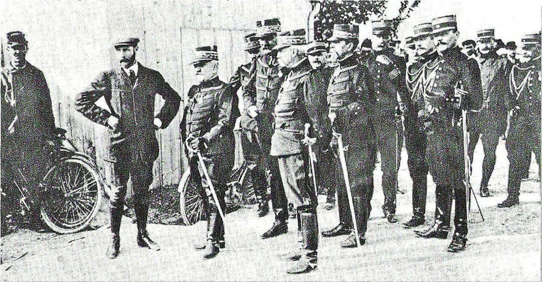 Les_généraux_Jean_Brun,_Felix_Albert_Journée,_Gouraud avec Henri Farman. Devant les hangars du constructeur à Bouy.